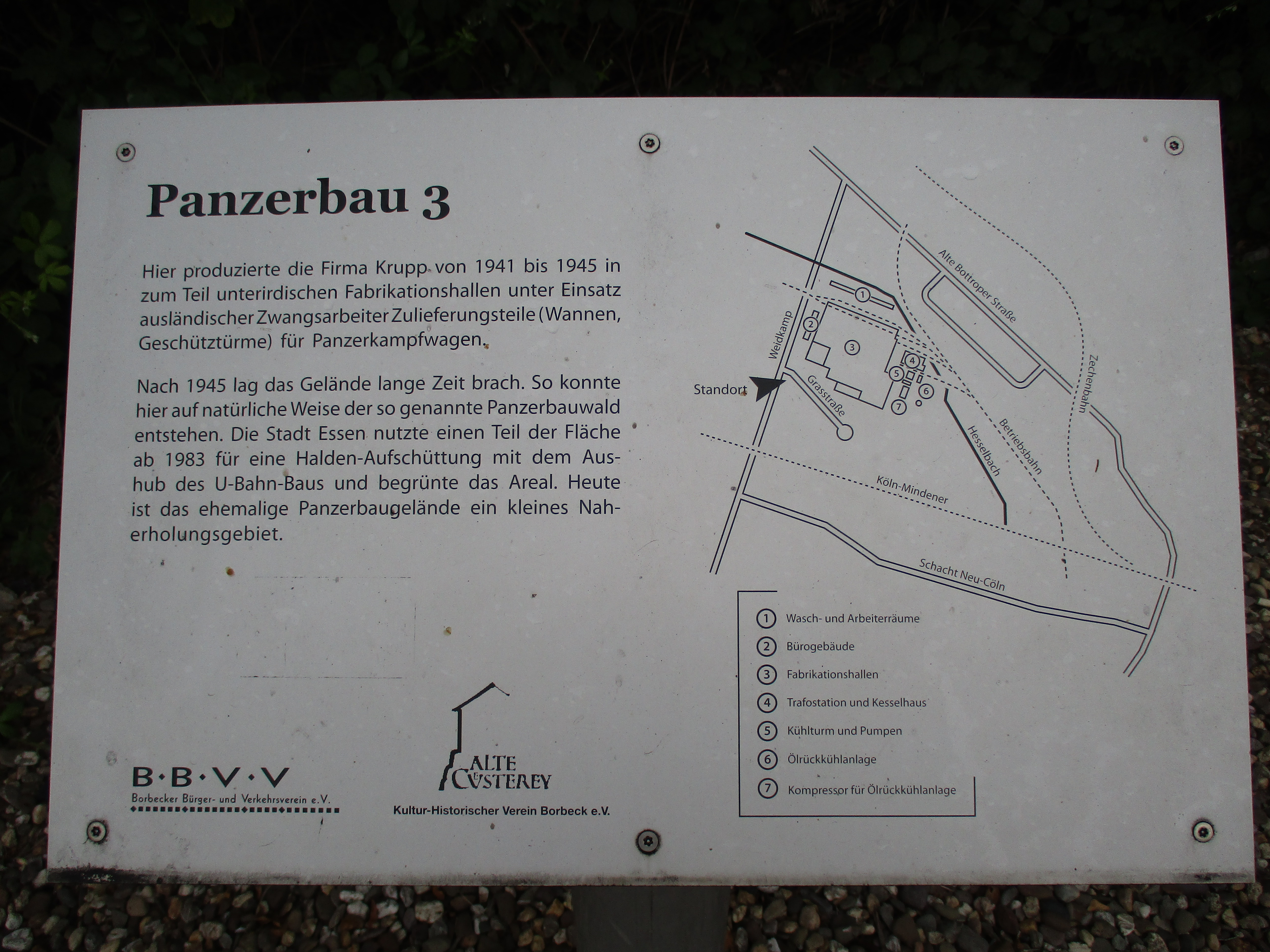 Panzerbau III war eine Rüstungsschmiede der Firma Krupp während dem 2. Weltkrieg in Essen-Borbeck. Dort wurden Zulieferteile für den Tigerpanzer gefertigt. Heute befindet sich auf der Fläche ein kleines Naherholungsgebiet. Hier und da entdeckt man heute noch Fundamentreste der ehemaligen Panzerfabrik.